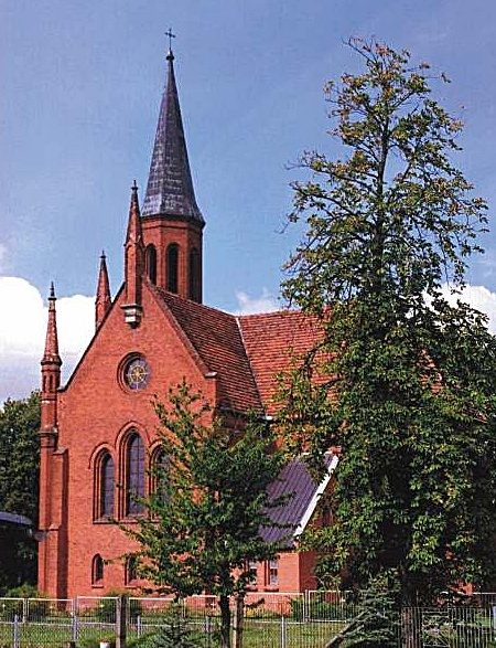 Kościół Narodzenia Najświętszej Maryi Panny w Szymonkowie